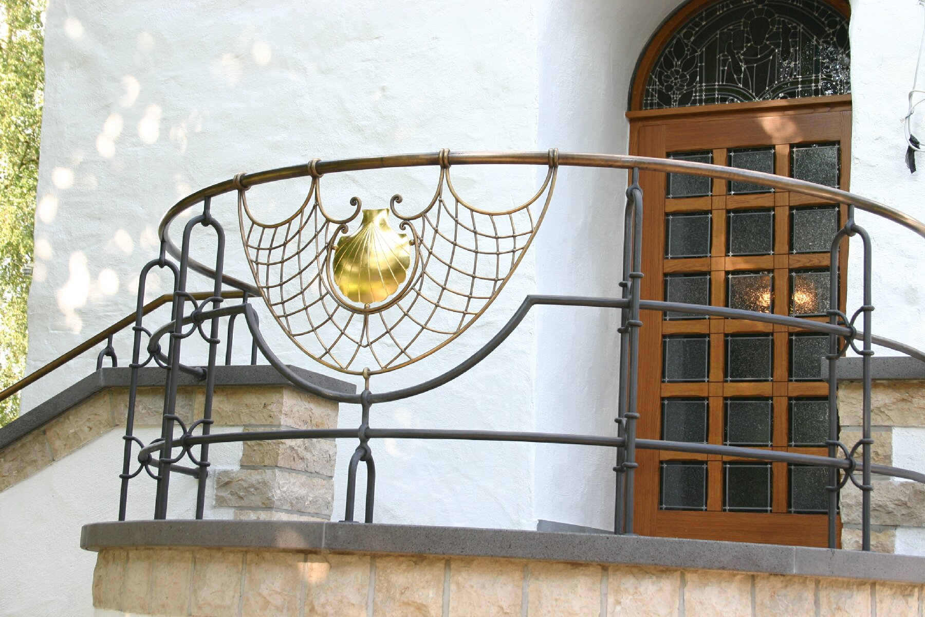 Kirche Elspe Pilgermusche am Turmeingang